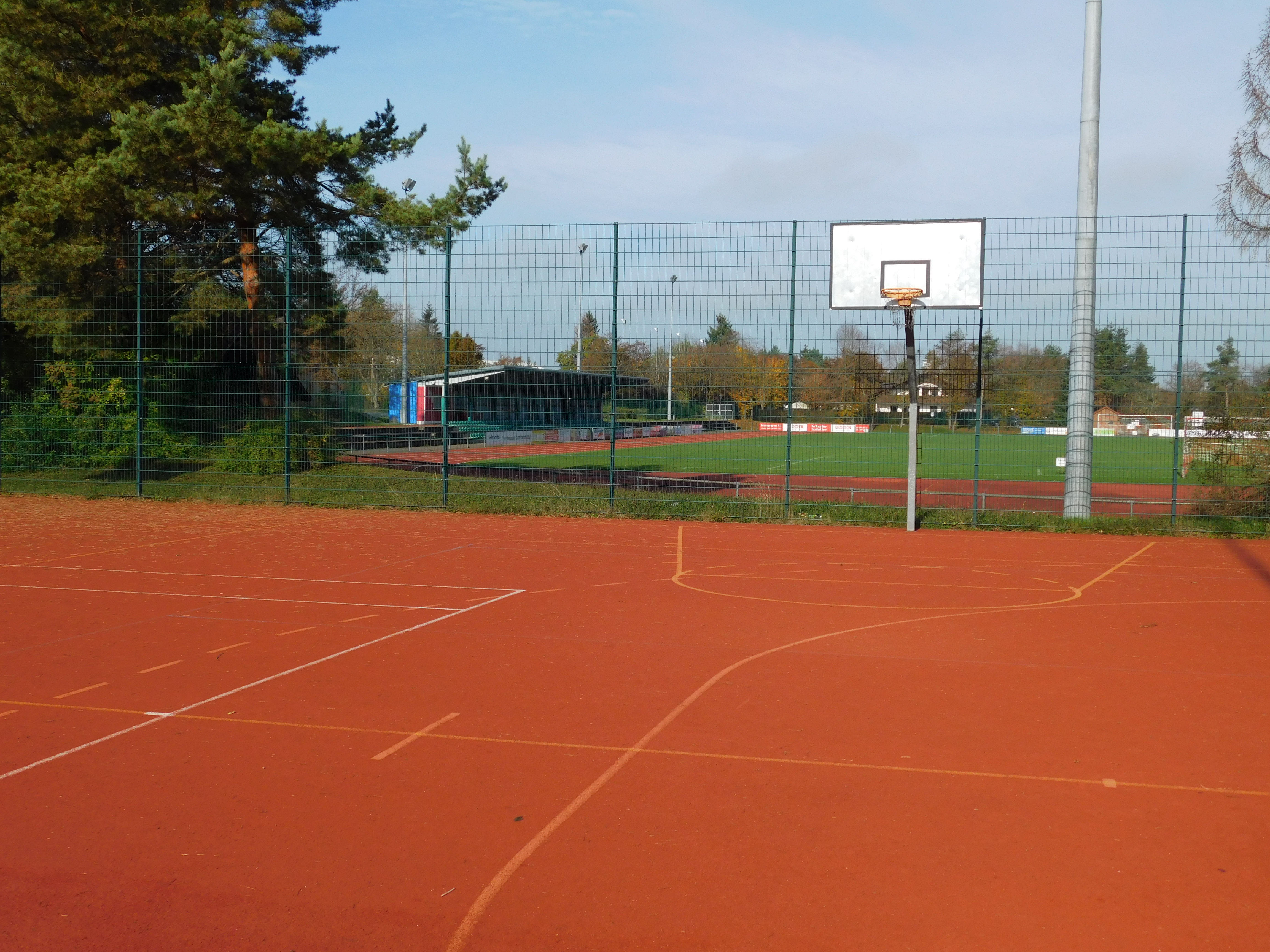 Christoph-Probst-Gymnasium Gilching Bayern Deutschland Sportplätze.